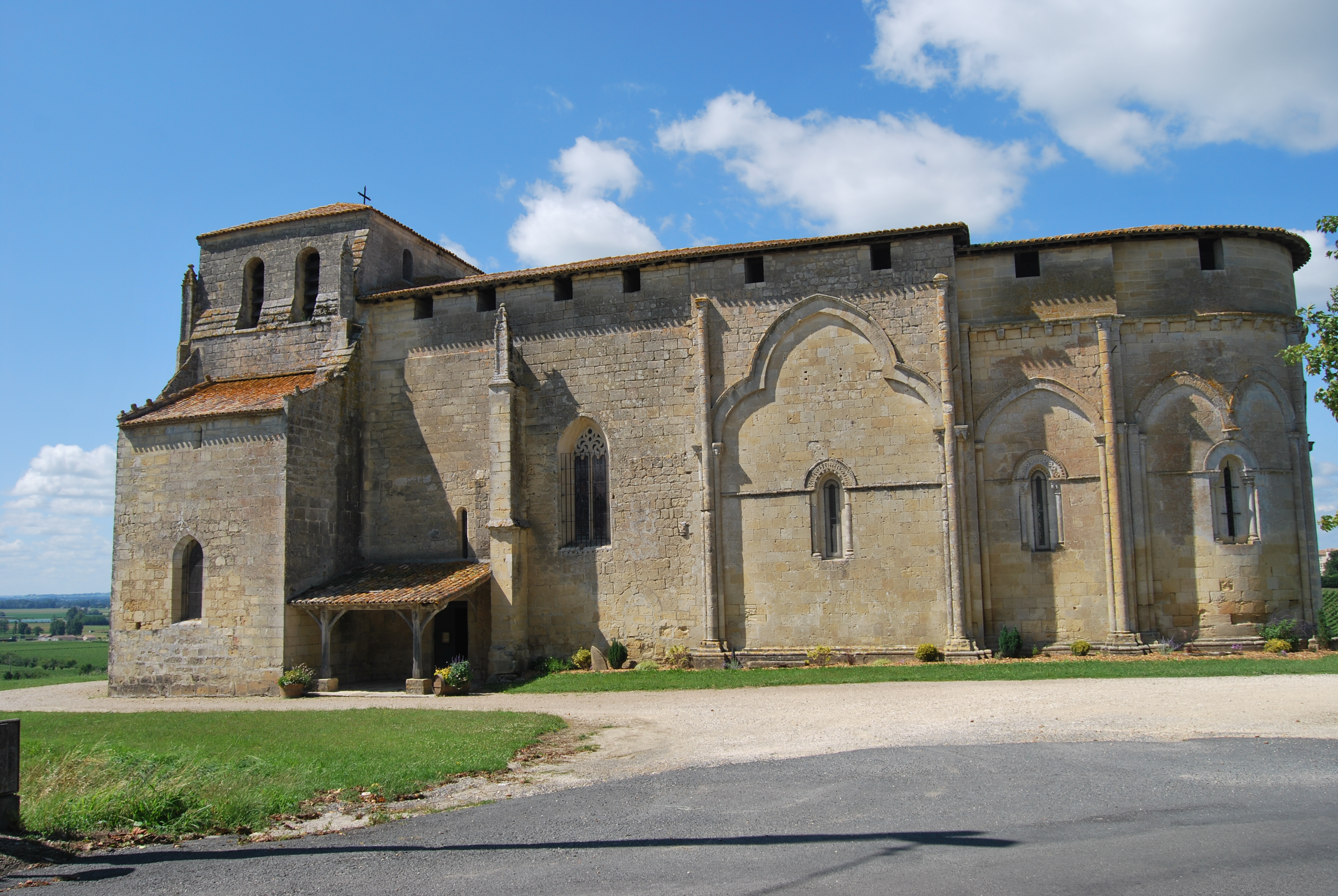 Église Saint-Pierre de Pujols